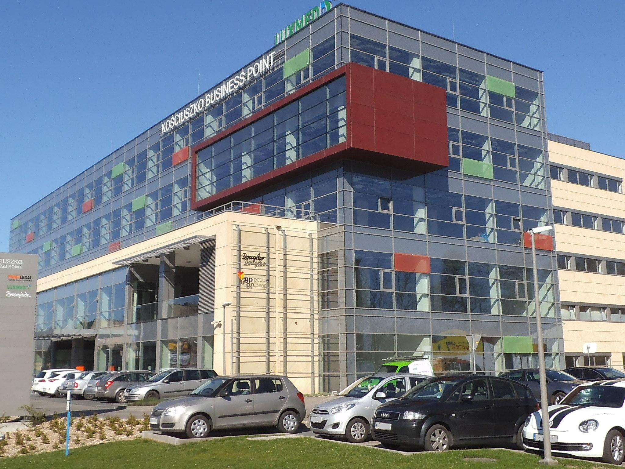 Biurowiec Kościuszko Business Point w Toruniu